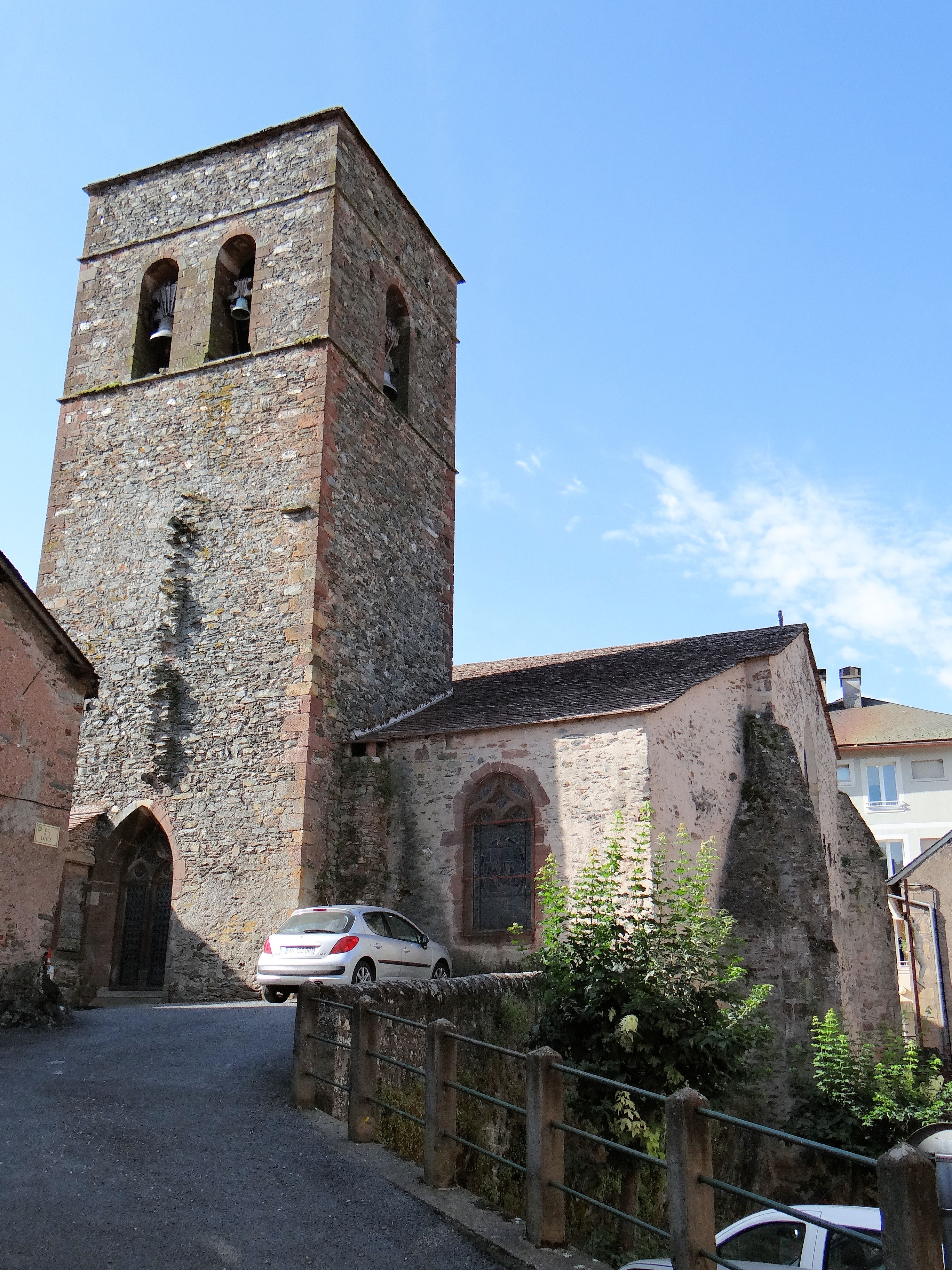 Saint-Sernin-sur-Rance - Collégiale Saint-Sernin - Clocher et façade ouest de la collégiale